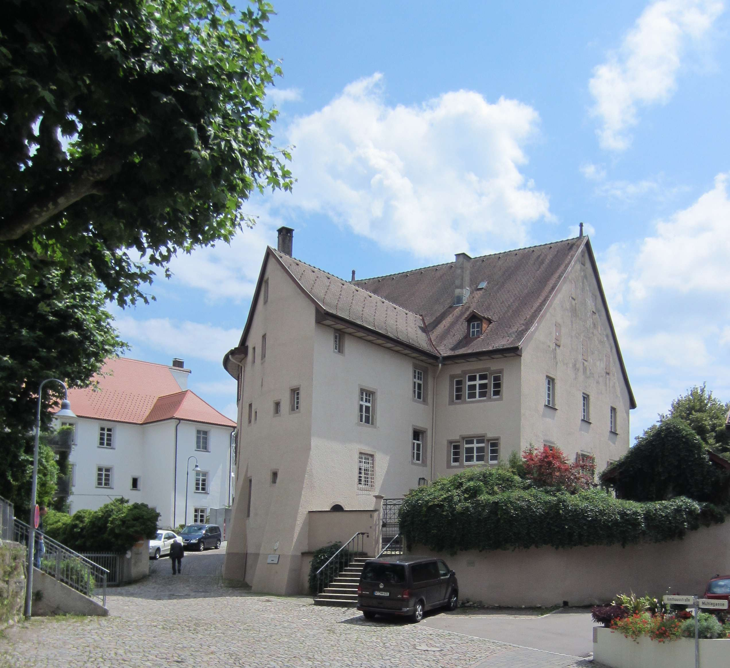 Waldshut Greiffenegg-Schlössle 2015